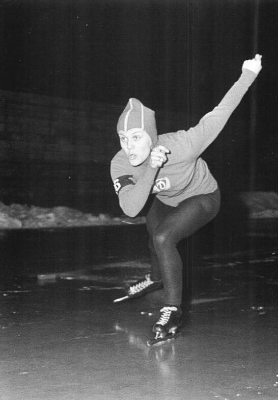 Helga Haase Zentralbild Wendorf Sche-Qu 4.1.1967 Berlin: Deutsche Meisterschaften im Eisschnellauf 1. Entscheidung über 500 m der Damen Die ewig junge Helga Haase (SC Dynamo Berlin) gewann am 4.1.1967 die erste Entscheidung über 500 m in 47,7 sec. Die Olympiasiegerin von 1960 über 500 m war allen ihren Konkurrentinnen überlegen. Abgebildete Personen: Haase, Helga: Eisschnelläuferin, Ehefrau von Helmut Haase, DDR